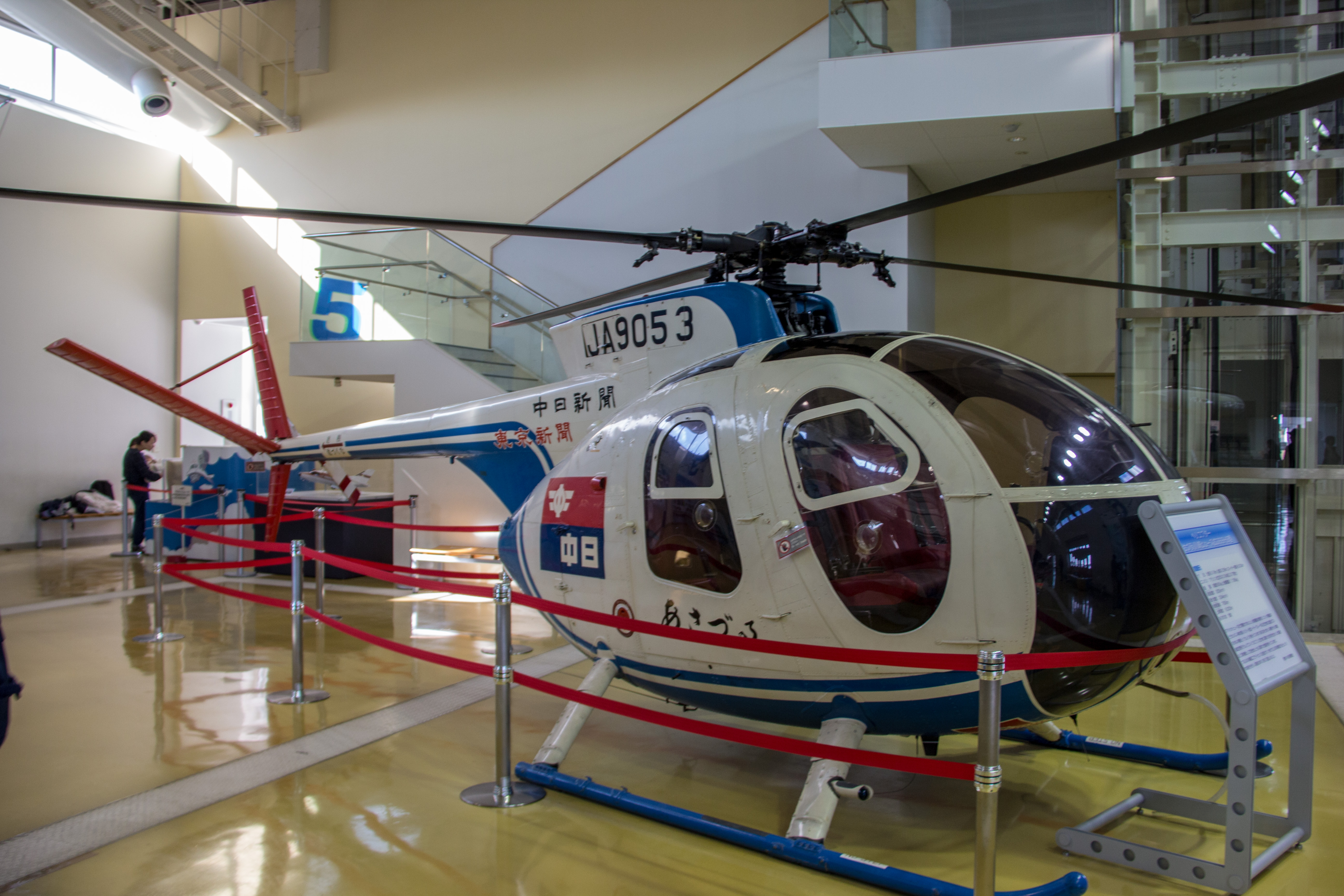 愛知県豊山町の航空館boonに展示されるヒューズ 369